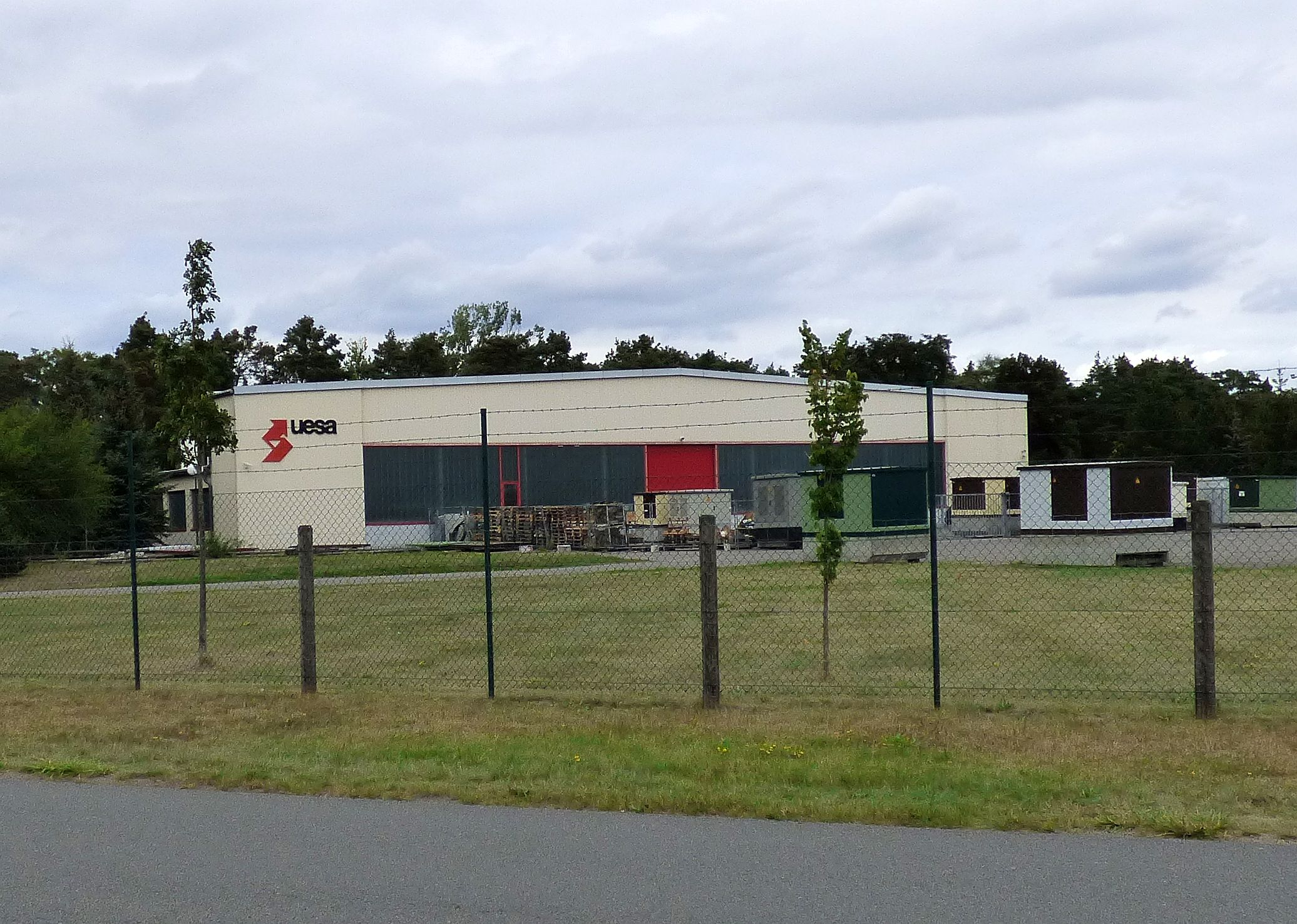 Gewerbe- und Industriegebiet Lönnewitz